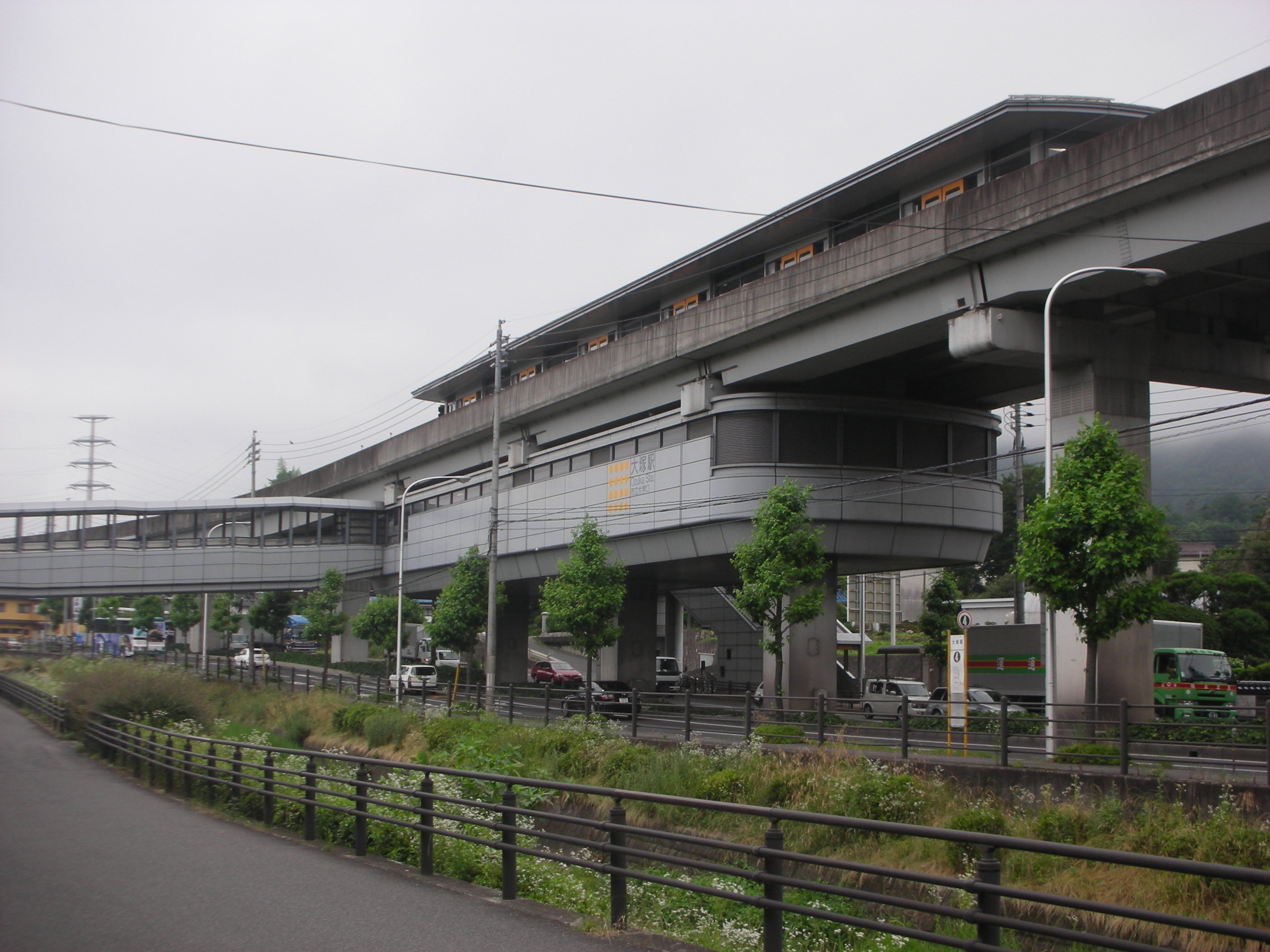 2010/06/21におんさき自身が撮影。広島県広島市、大塚駅。